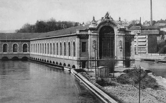 Genève - Usines des Forces Motrices du Rhône